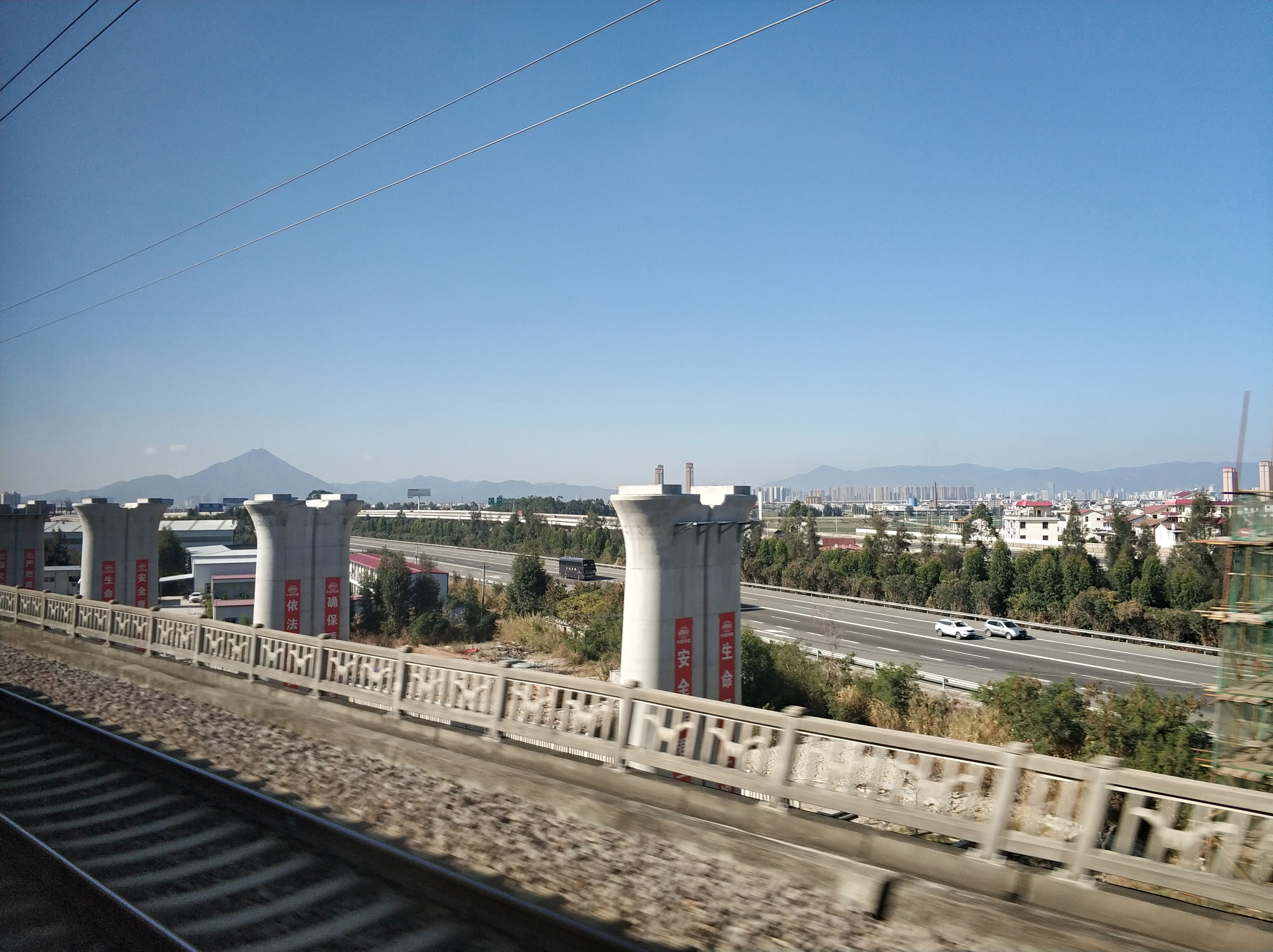 中文（中国大陆）: 位于福厦铁路莆田站至涵江站段，桥墩为福厦高铁，右侧公路为G15沈海高速。